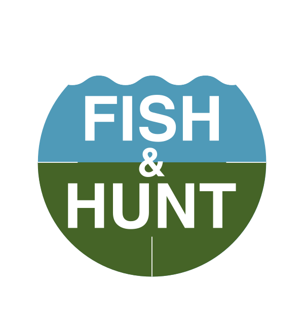 Logo společnosti FISH&HUNT NOW s.r.o.